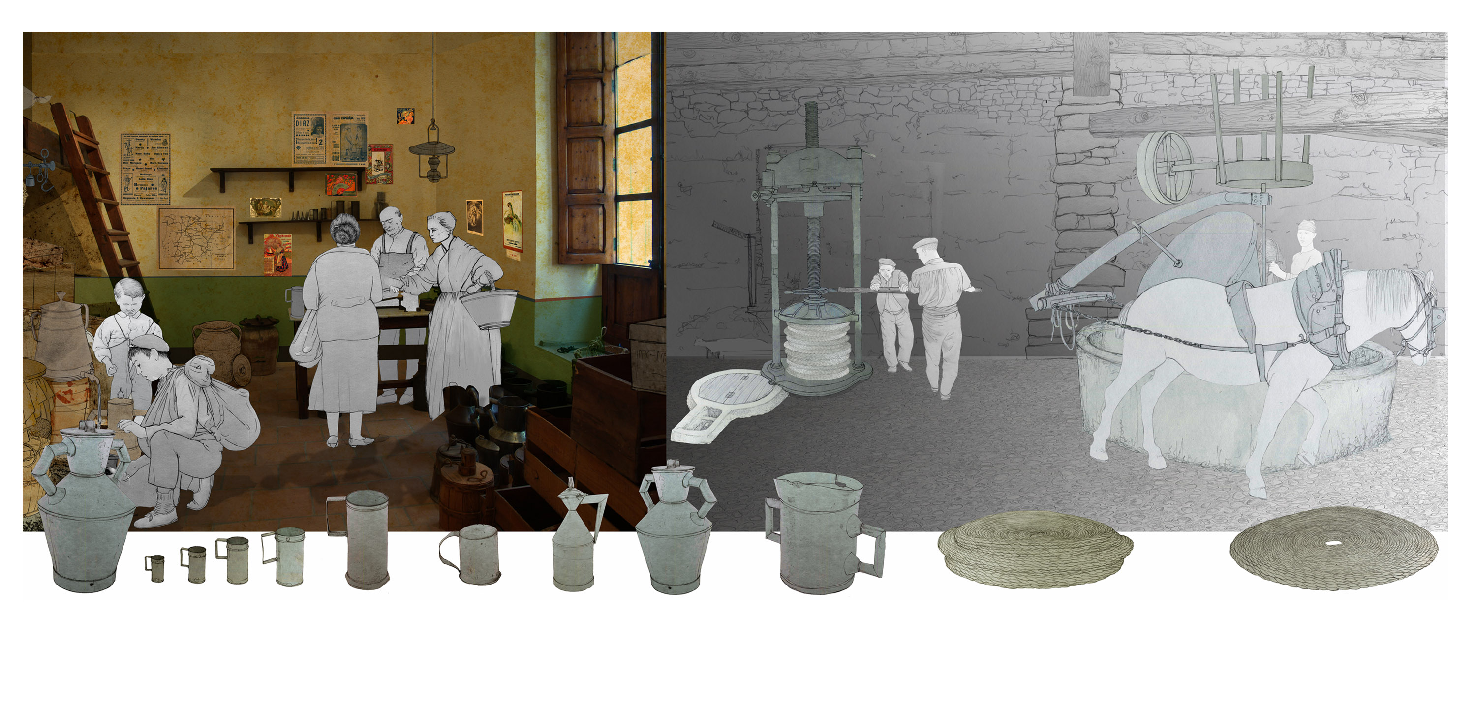 Il·lustracions d'Andrés Marín Jarque per a l'exposició permanent "Secà i Muntanya" del Museu Valencià d'Etnologia. S'il·lustren els escenaris del medi rural i el procés (treball) mitjançant el qual s'aprofita este espai.